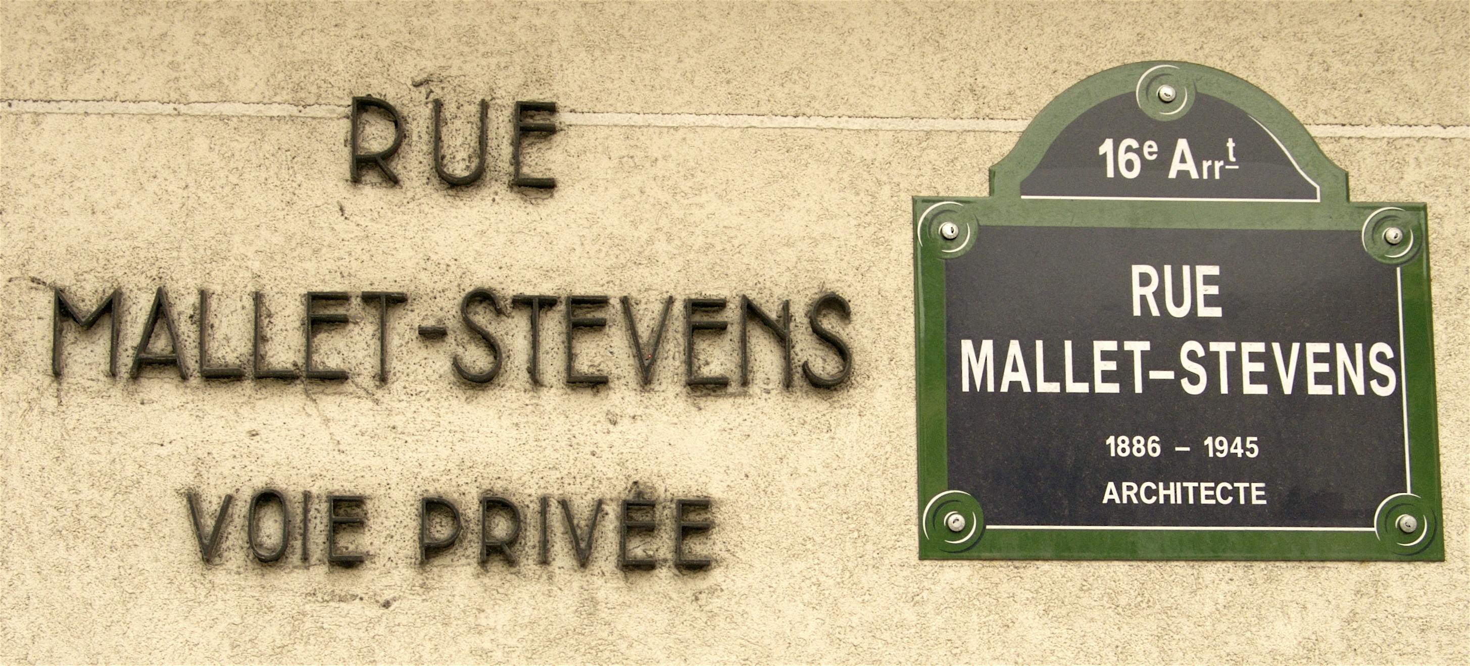 Rob Mallet-Stevens